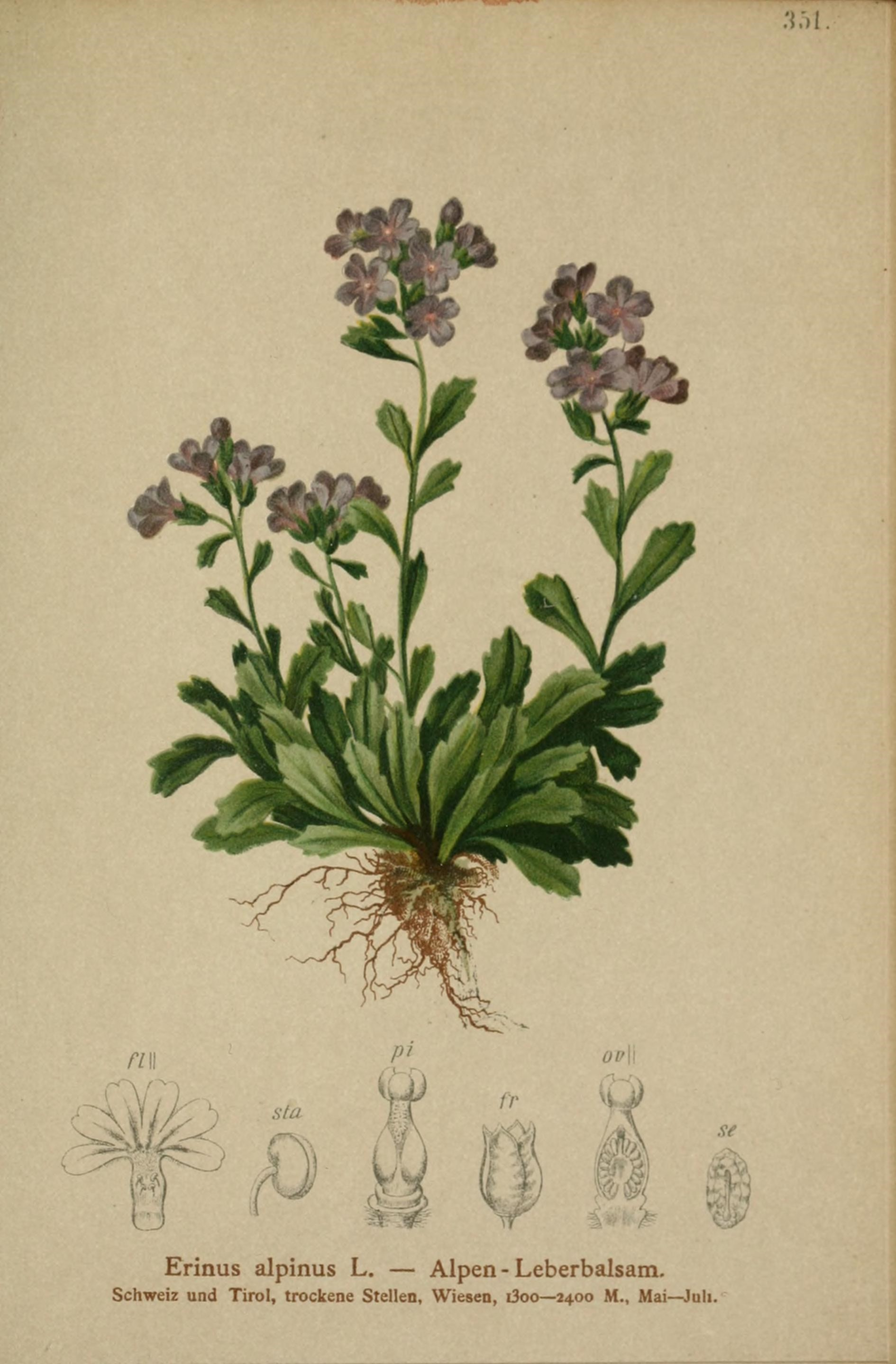 .;»i Erinus alpinus L. — Alpen - Leberbalsam. Schweiz und Tirol, trockene Stellen, Wiesen, 1300—2400 M., Mai— Juli.